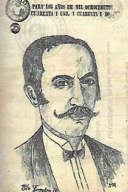 Timoteo Quevedo por los años de 1840.